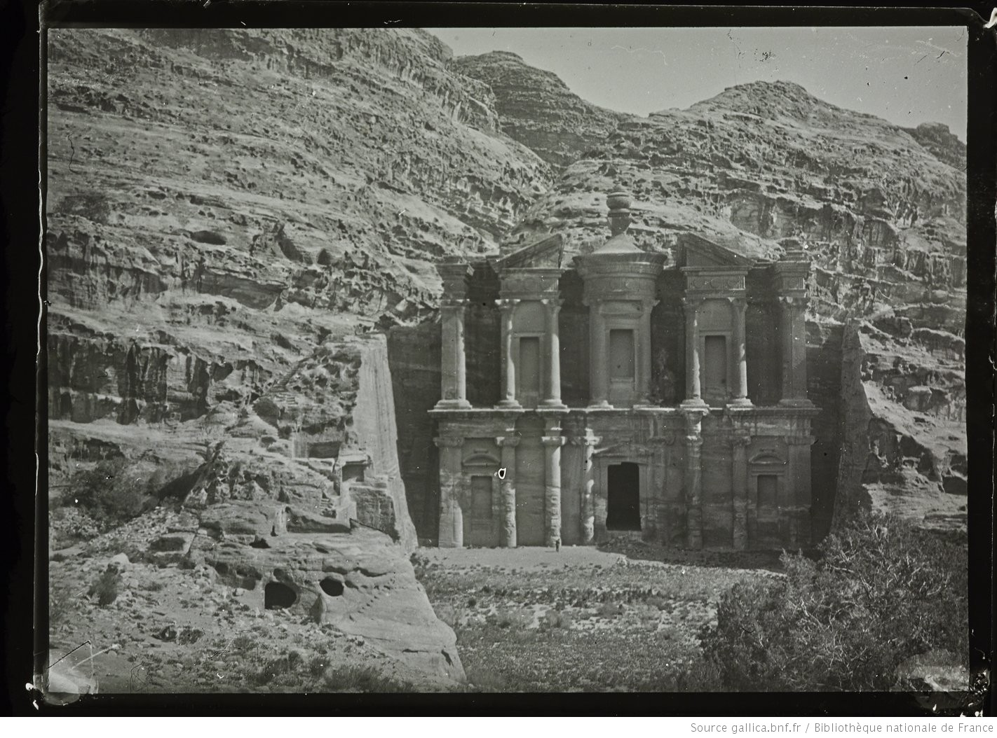 صورة خزنة البتراء في الأردن وقد كانت بلاد الشام حينها، ملتقطة بين عامي 1856 و 1912